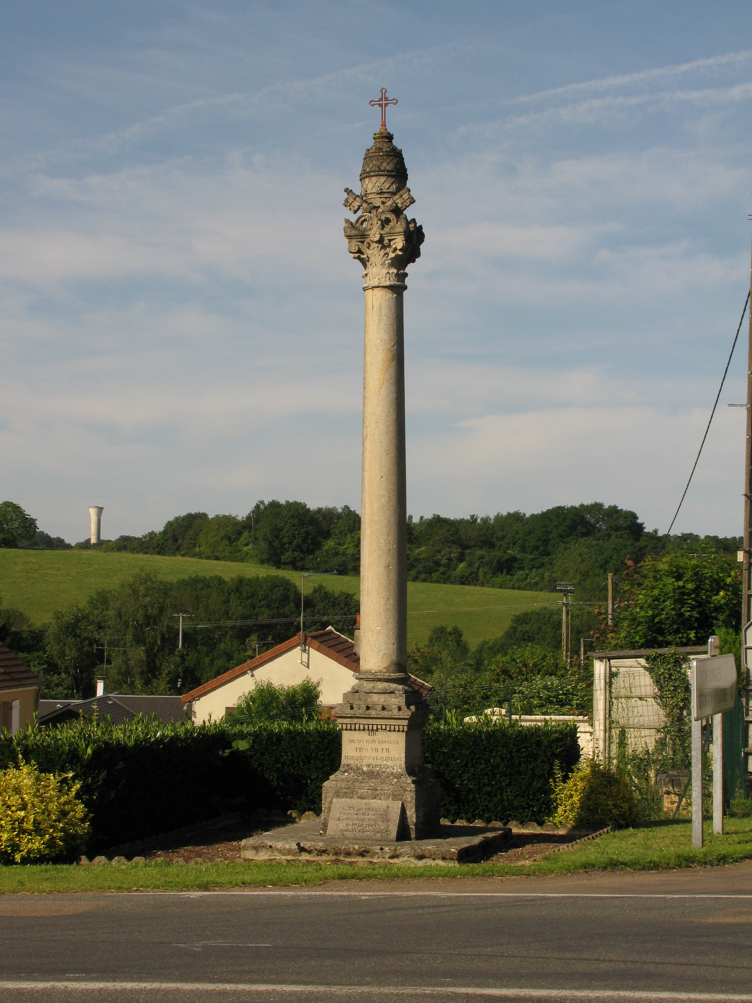 General view.